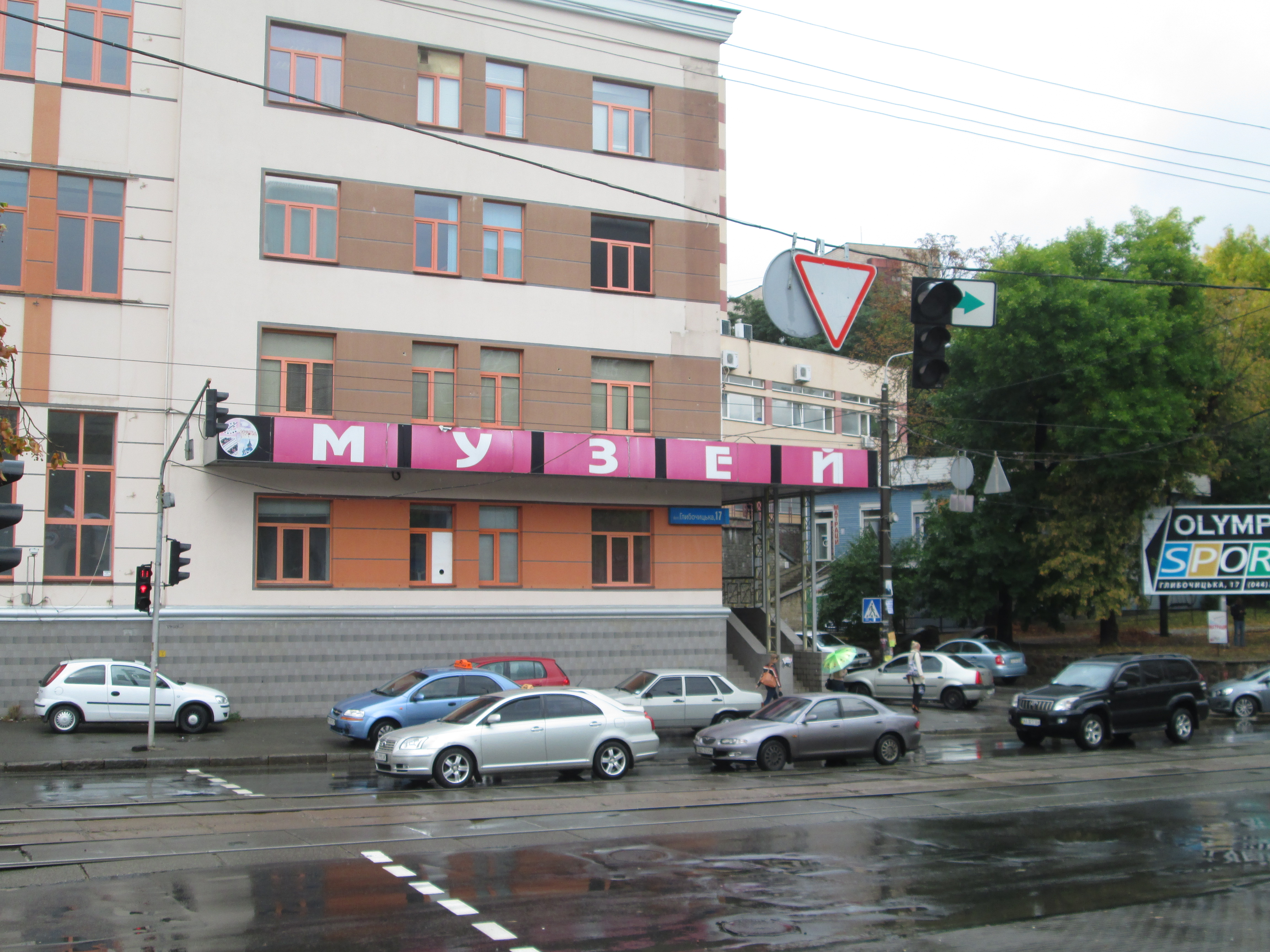 Музей сучасного образотворчого мистецтва України